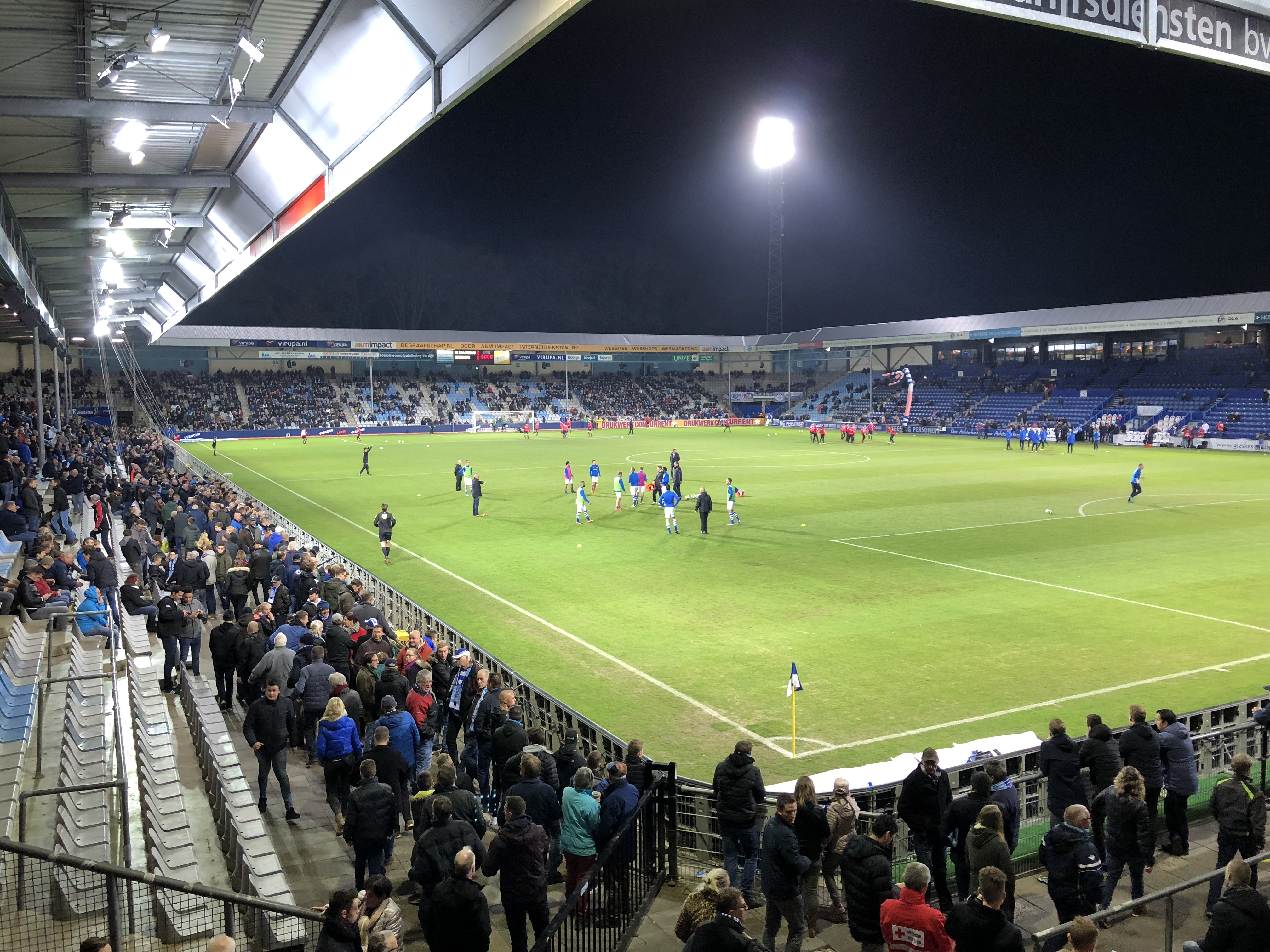 Wedstrijd van De Graafschap in De Vijverberg